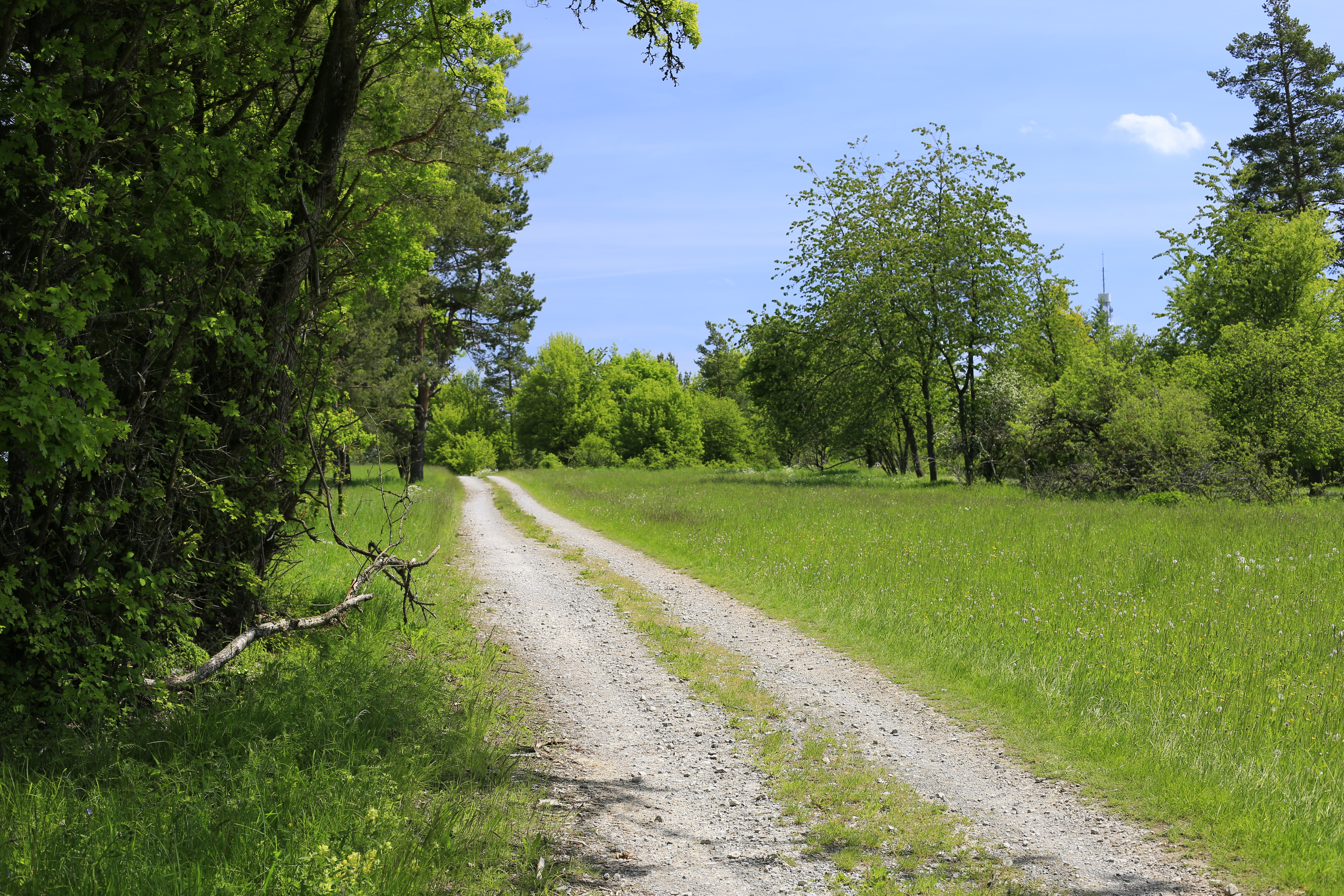 Feldweg auf der Gebersackhalde im Naturschutzgebiet Gebersack, umgeben von typischer Vegetation, Blick auch auf die Funkstelle Lerchenberg.